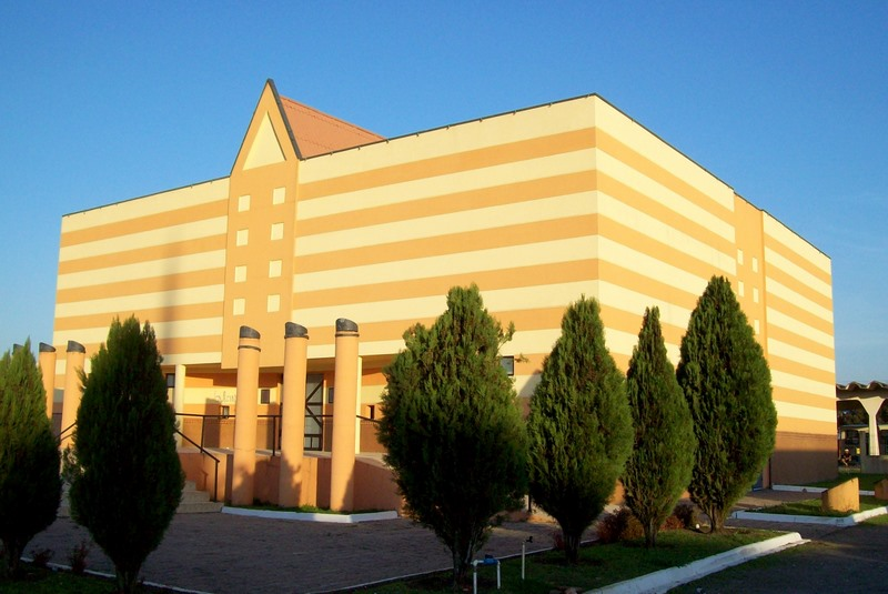 Teatro Municipal José Carlos Zanlorenzi em Campina Grande do Sul (Grande Curitiba), PR, Sul do Brasil.